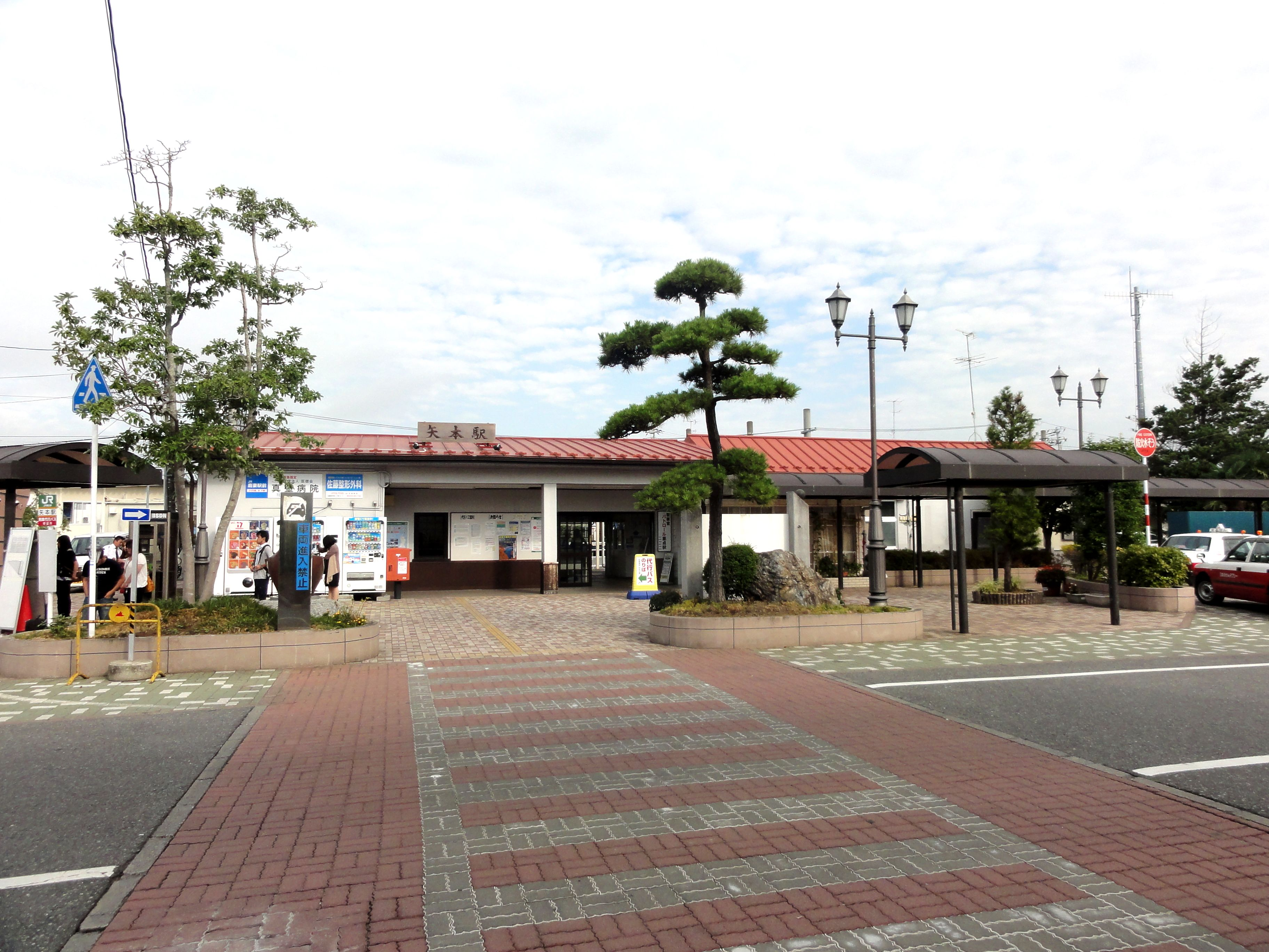 矢本駅